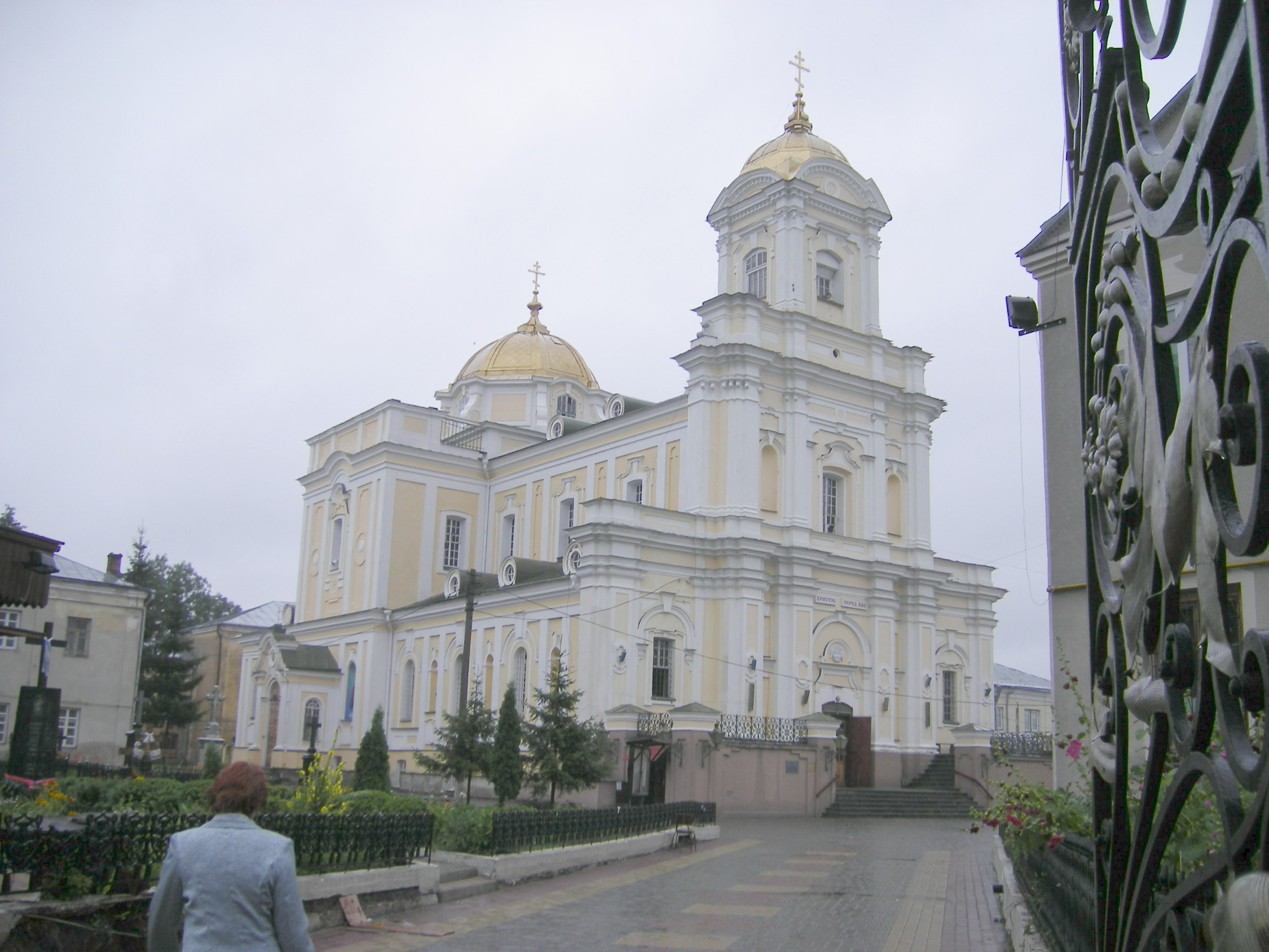 Lutsk